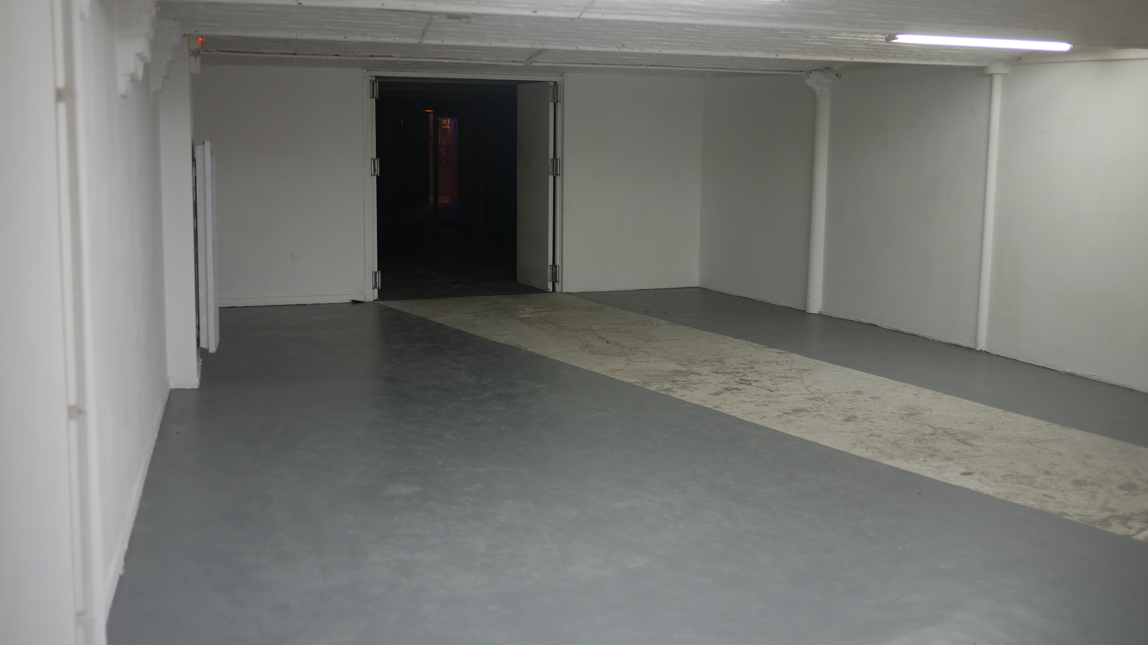 Vue de la salle d'exposition de la malterie, bd Victor Hugo à Lille